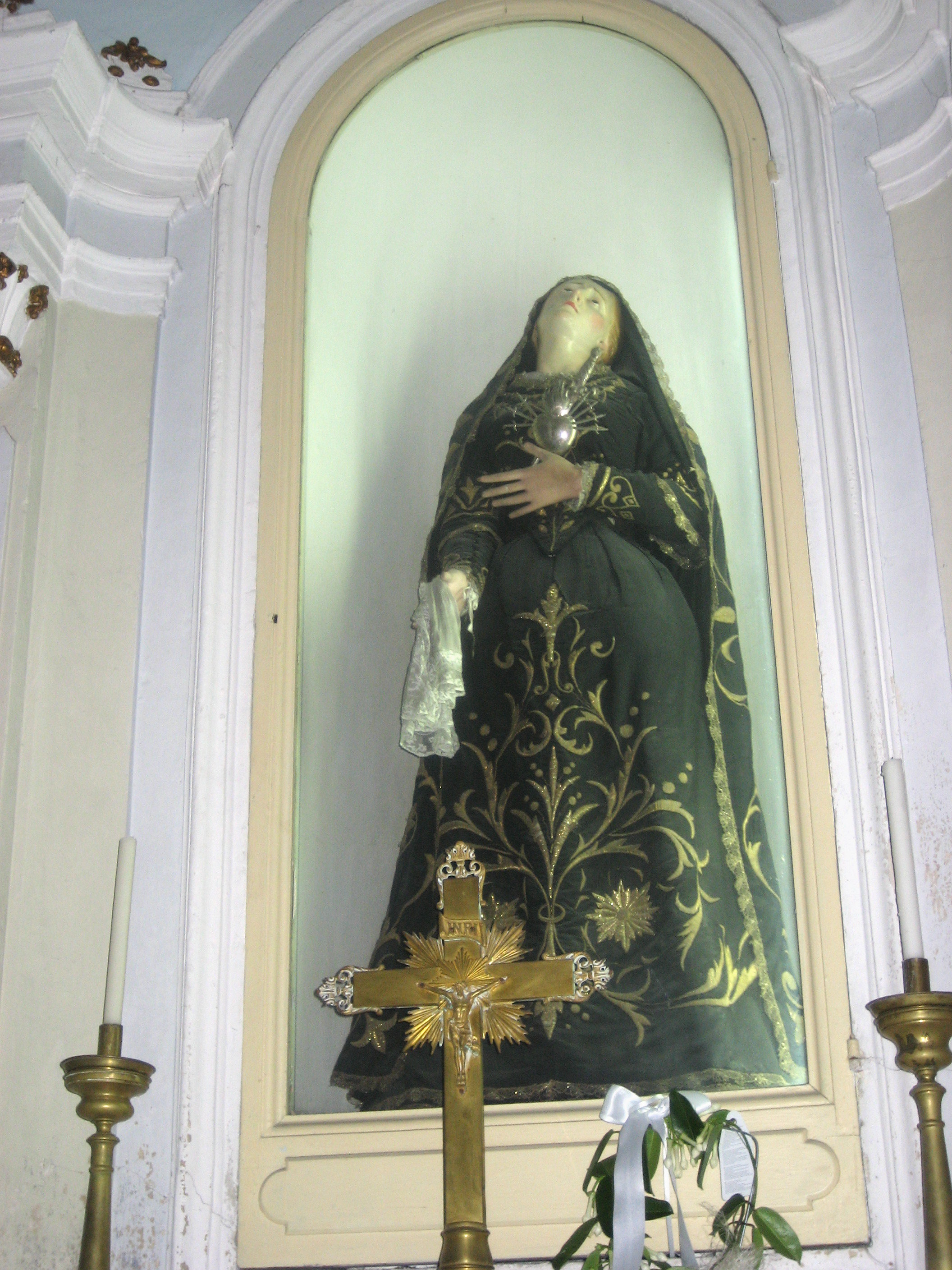 Statua dell'Addolorata nella chiesa di San Francesco ad Atri.